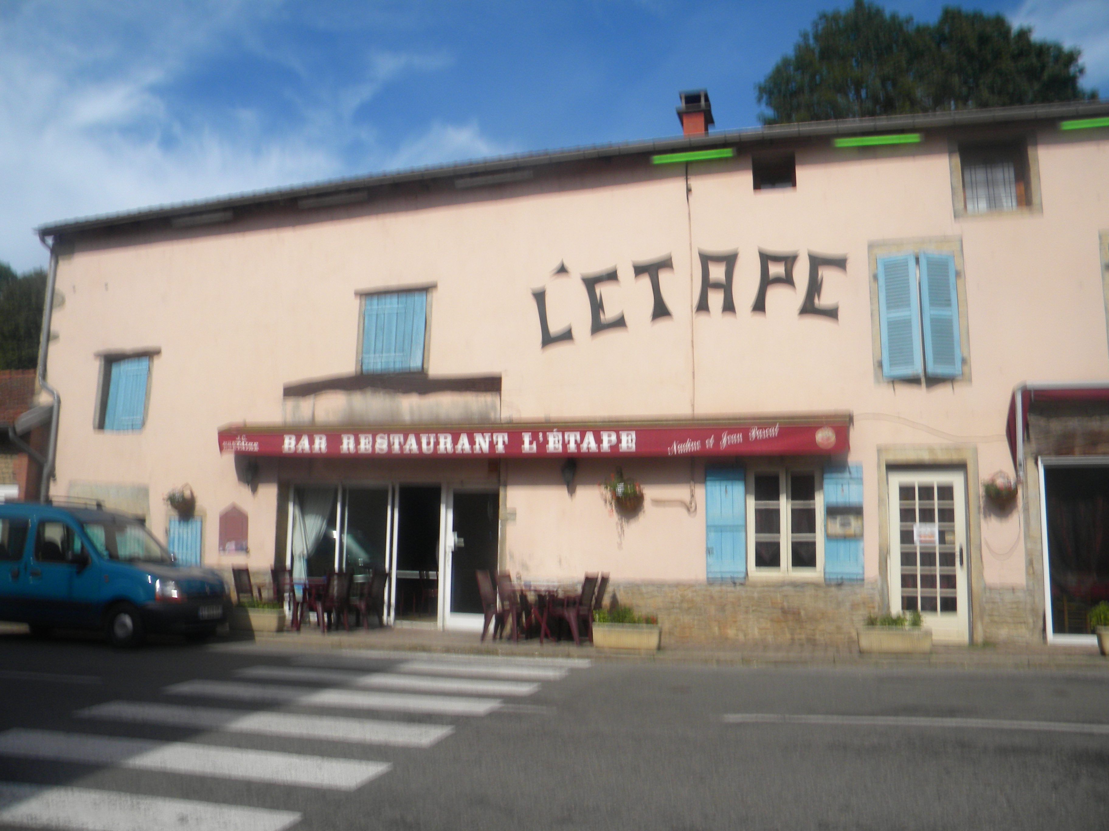 Clermain hameau de la Garde